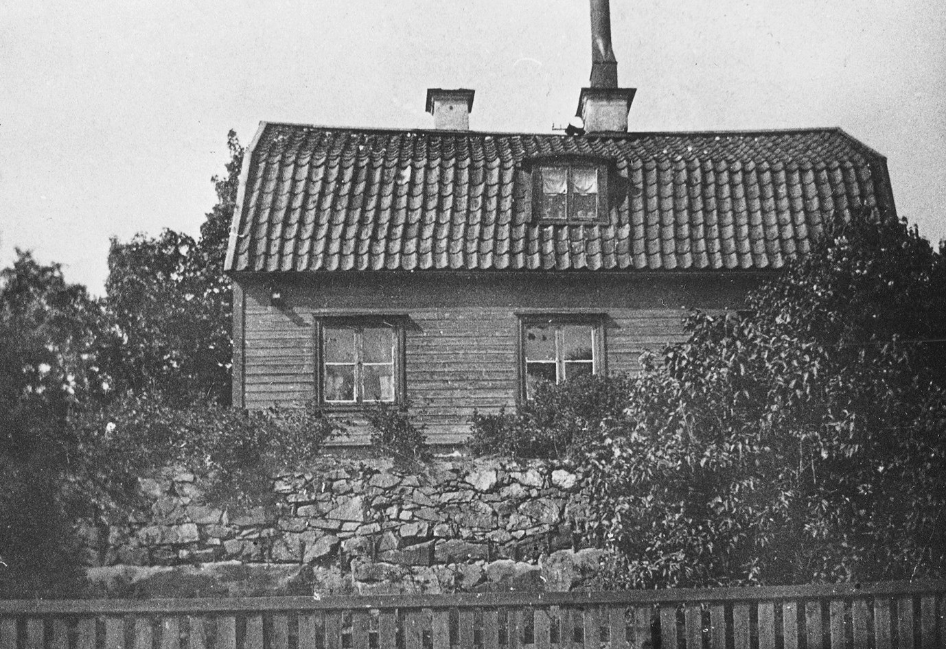 Stora Mejtens gränd 14 (nuv. fastighet Stenkolet 2)